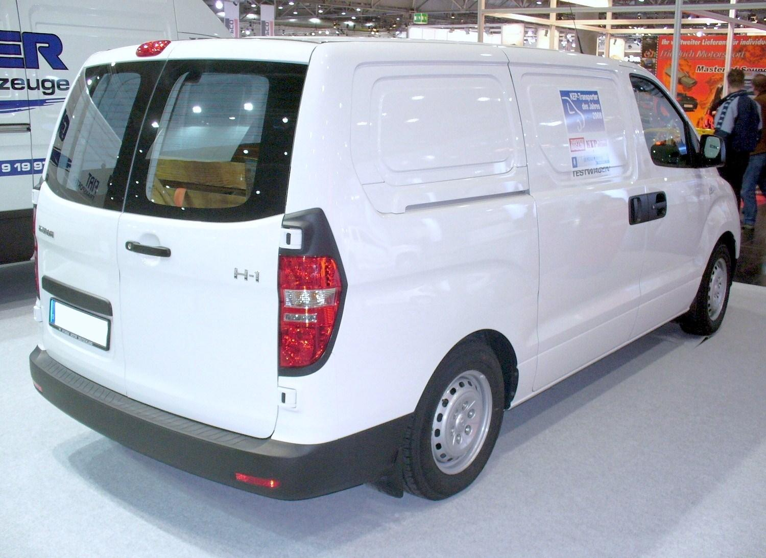 Hyundai H-1 Bus